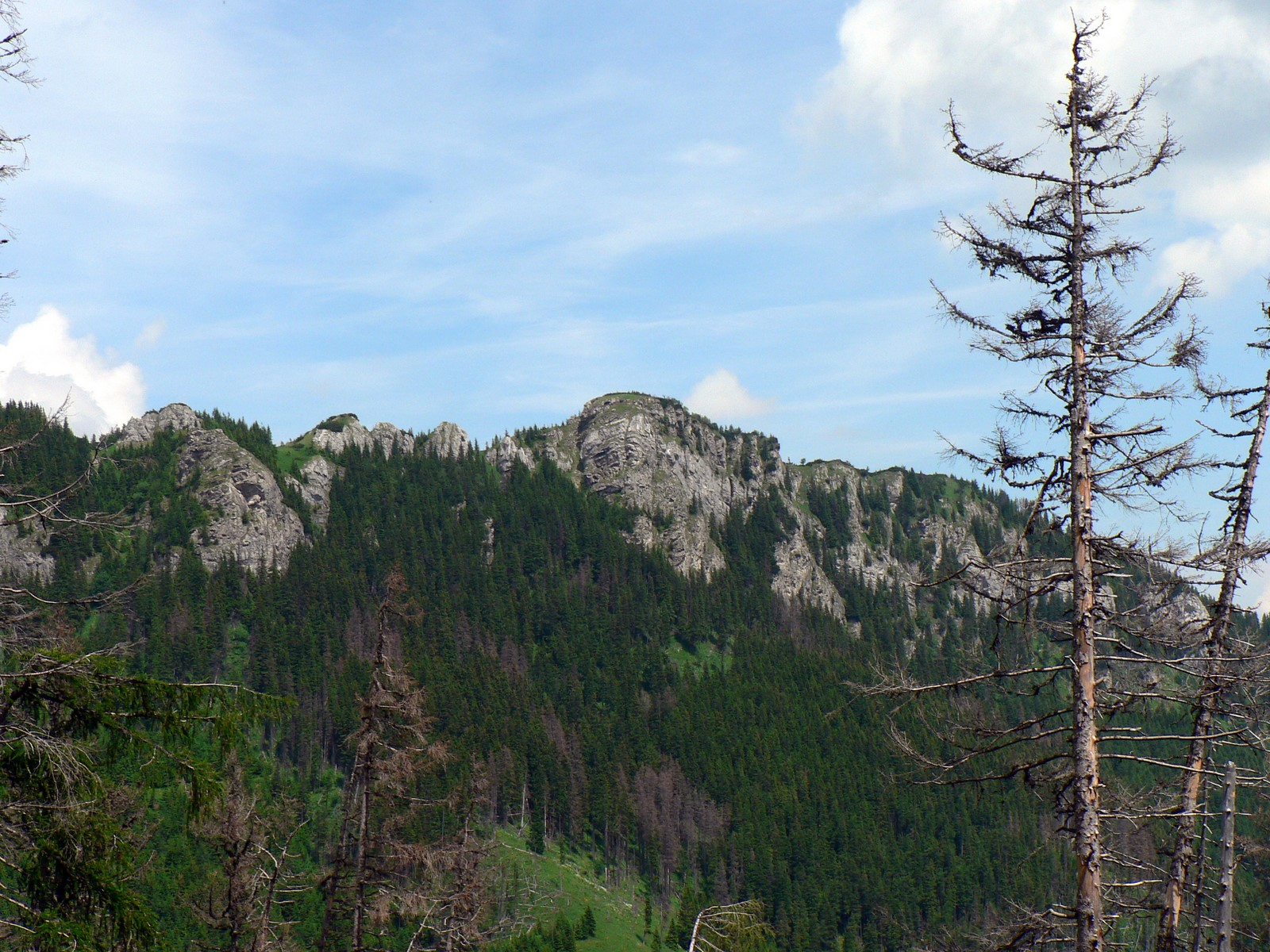 Kozi Grzbiet ze szlaku ze Schroniska pod Szarotką do Doliny Białych Stawów